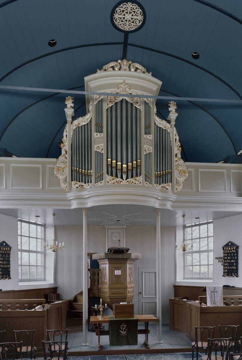 Nederlands Hervormde Kerk: Interieur, aanzicht orgel, orgelnummer 393 (opmerking: Gefotografeerd voor Het Historische Orgel in Nederland 1865-1872)